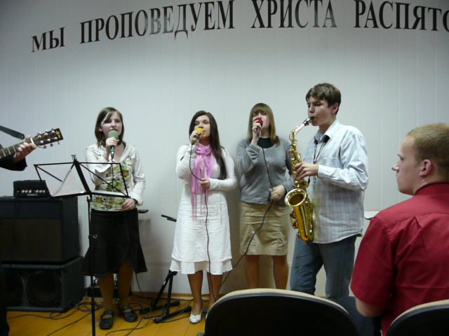 usługa młodzieży podczas nabożeństwa w zborze w Dubiczach Cerkiewnych